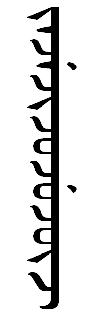 варианты чжа